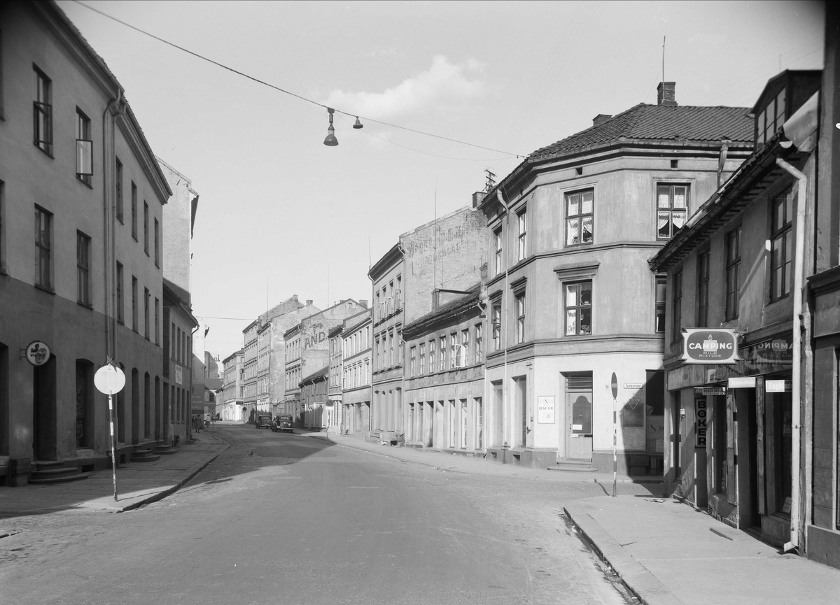 Karl den XIIs gate på Vaterland i Oslo 1961, like før saneringen av hele området.